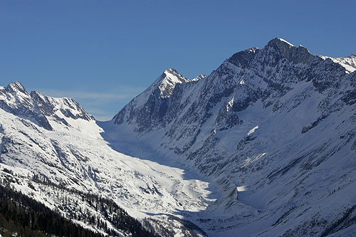 Blick von der Lauchernalp hin zum Langgletscher und der Lötschenlücke